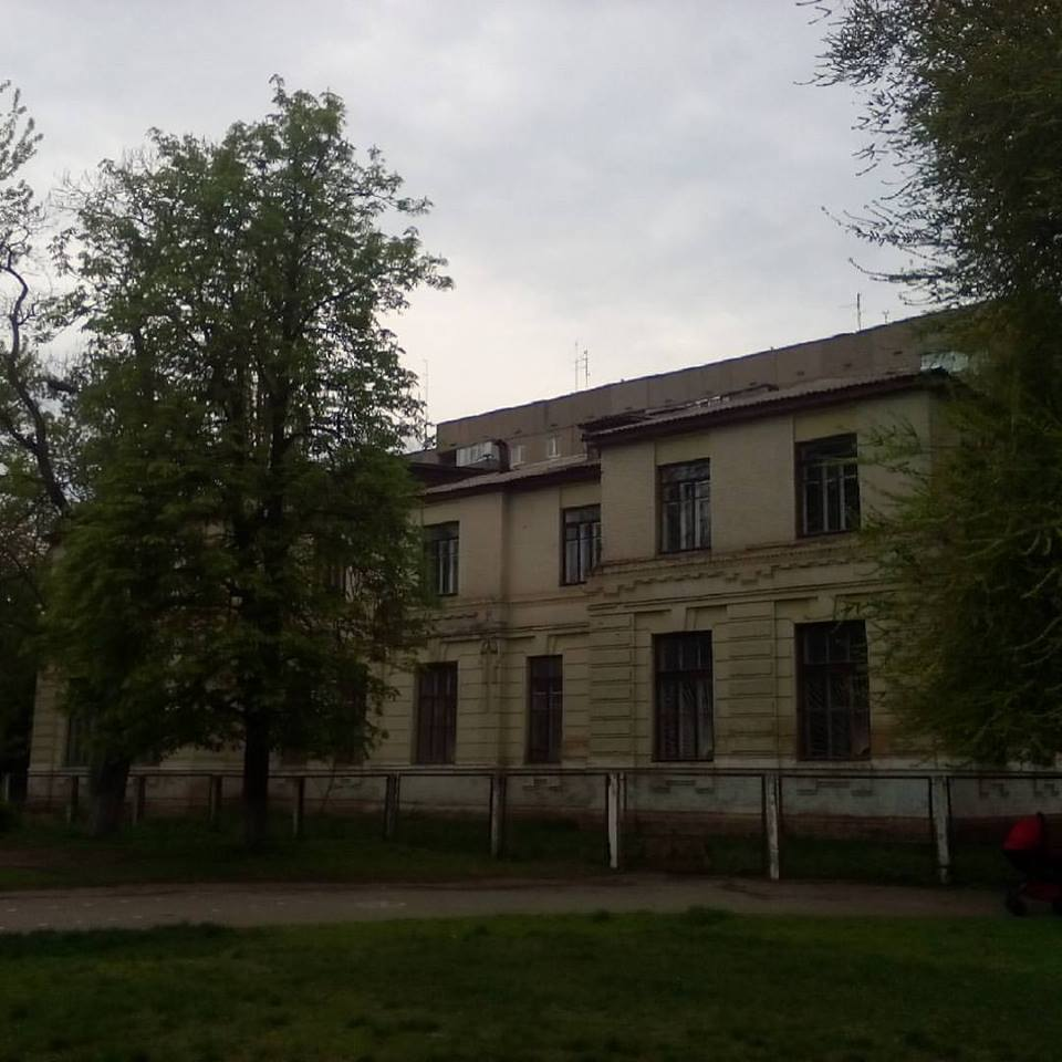 Стара будівля Черкаської ЗОШ №15